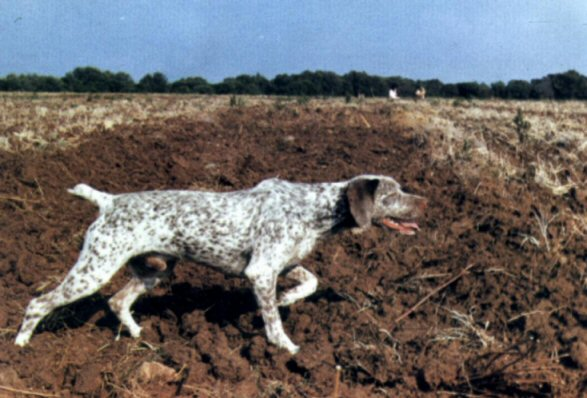 Pink1 du Rocher des Jastres